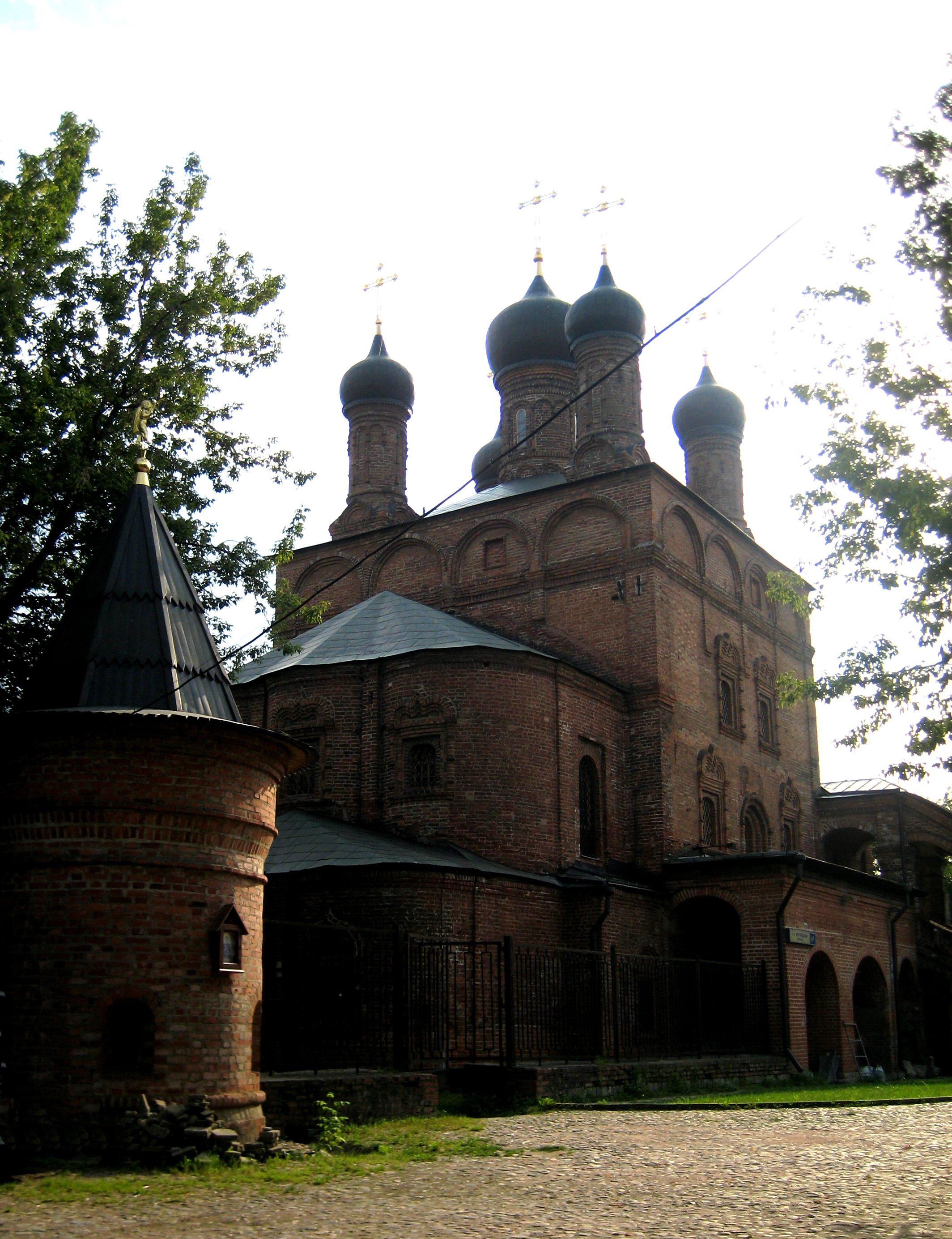 Крутицкое подворье